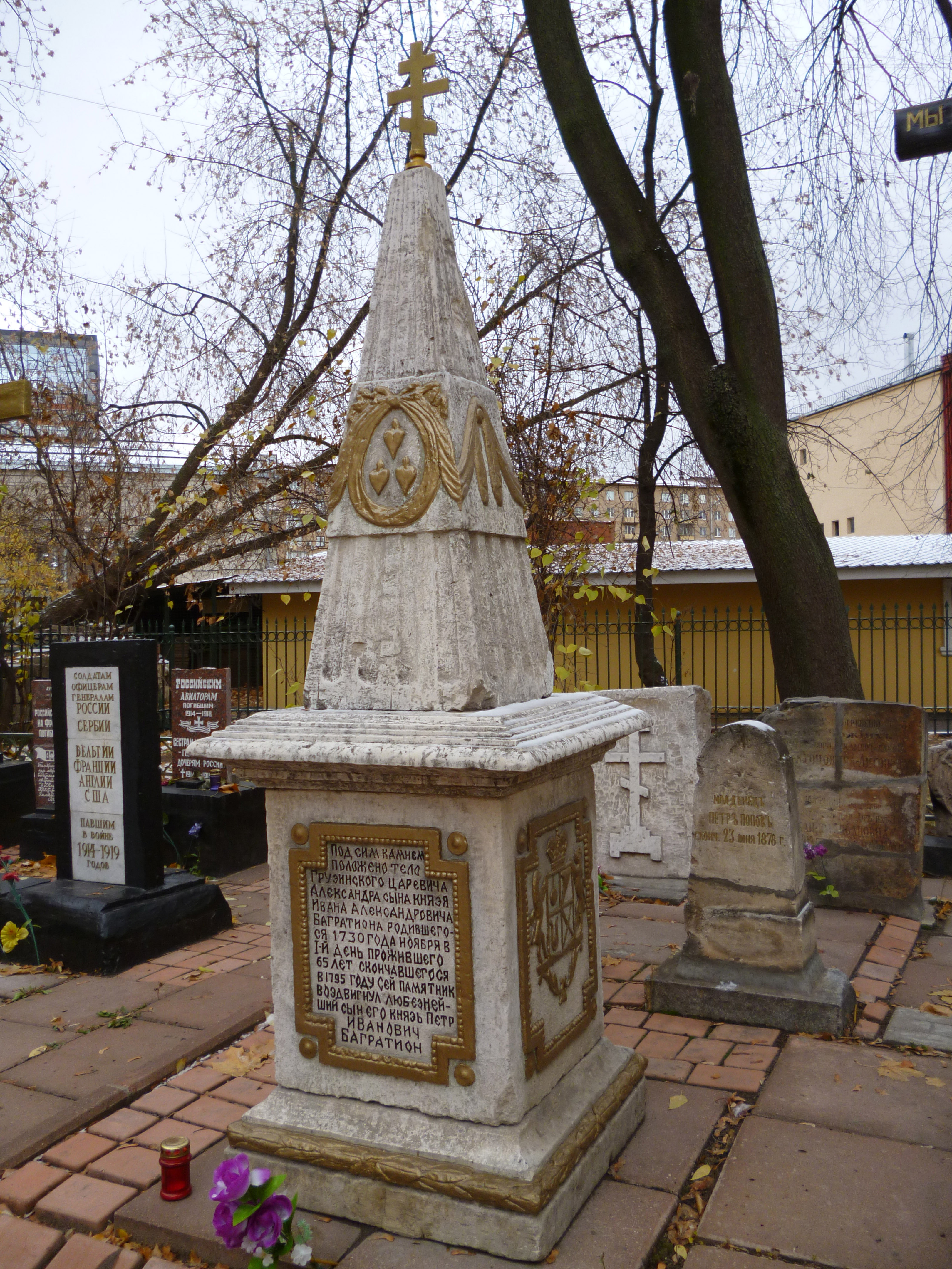 Надгробие князя Ивана Александровича Багратиона (1730—1795), отца Петра Ивановича Багратиона. Церковь Всех Святых (Москва, Ленинградский проспект, 73)